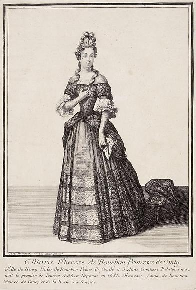 Marie-Thérèse de Bourbon (1666-1732), princesse de Conti